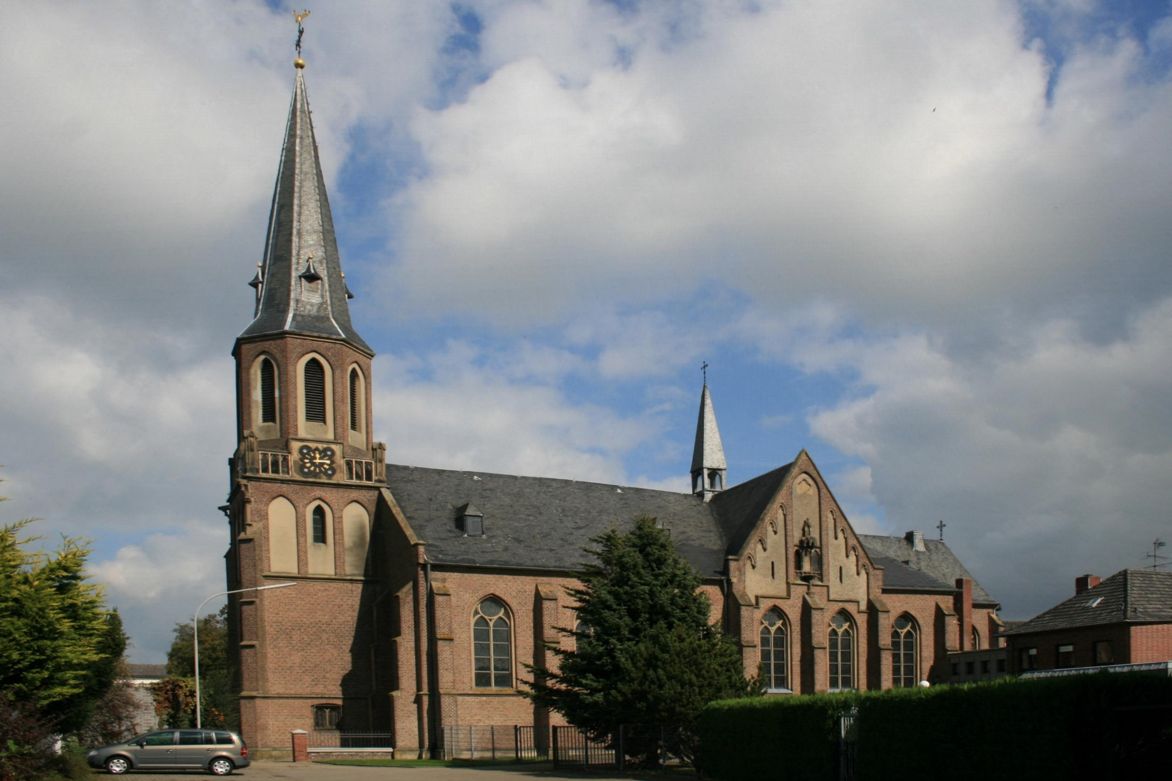 Baudenkmal in der Gemeinde Jüchen Nr. 015